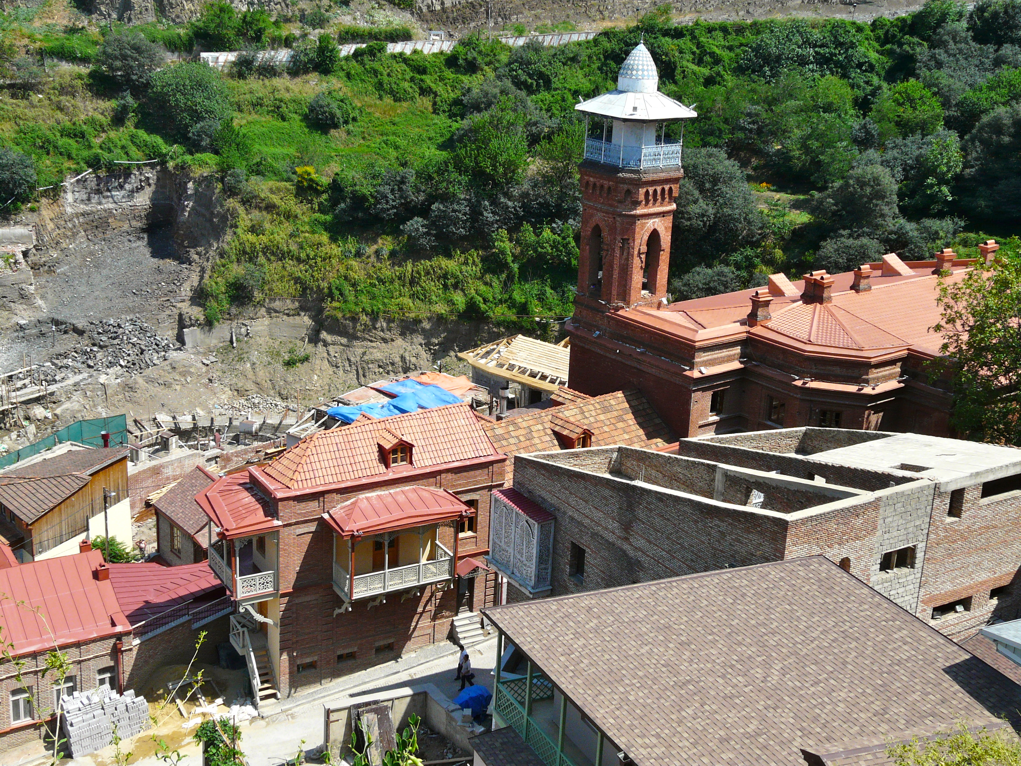 mosquée